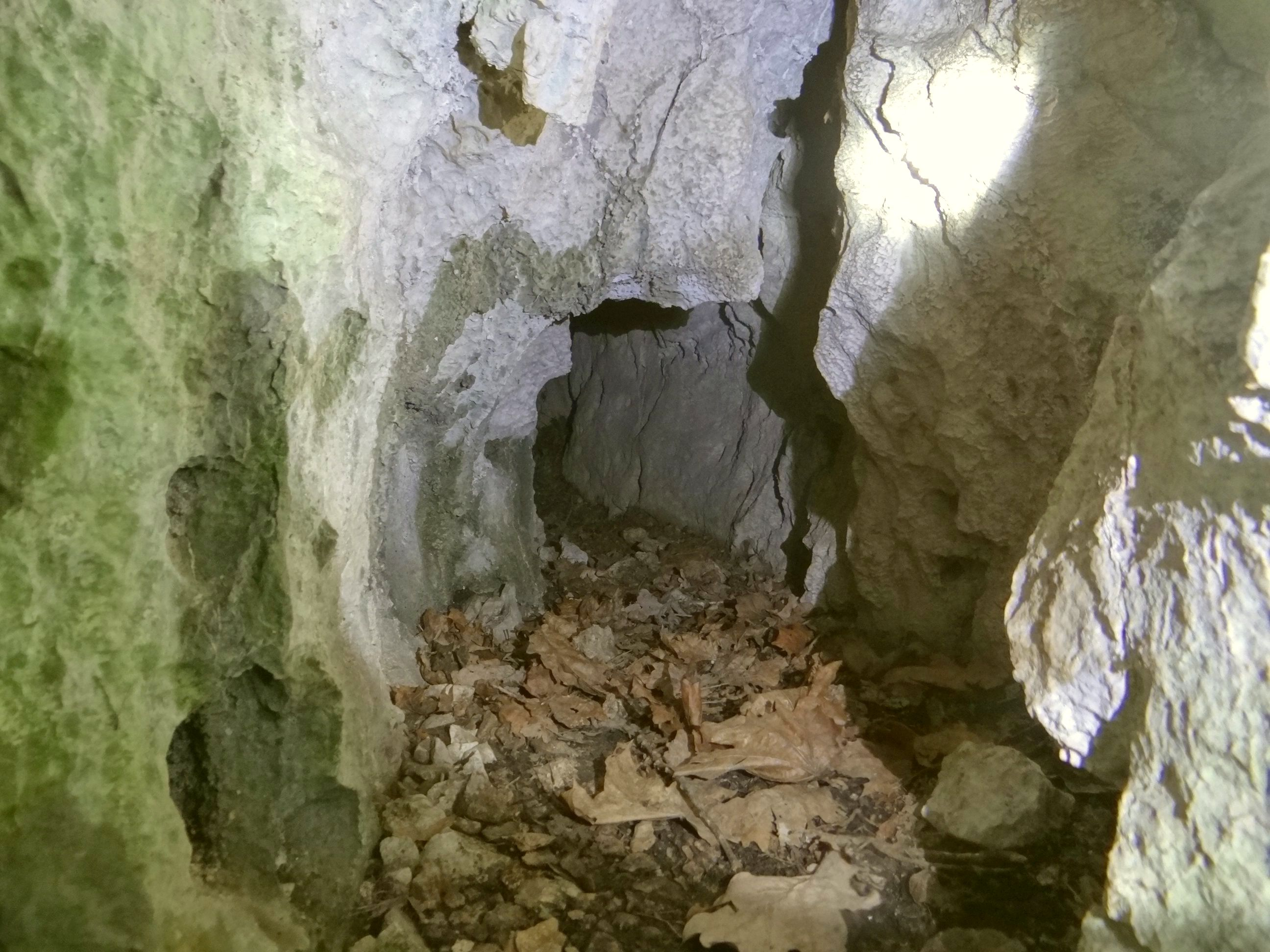 Tunel Ciasny na Tomaszówkach Dolnych